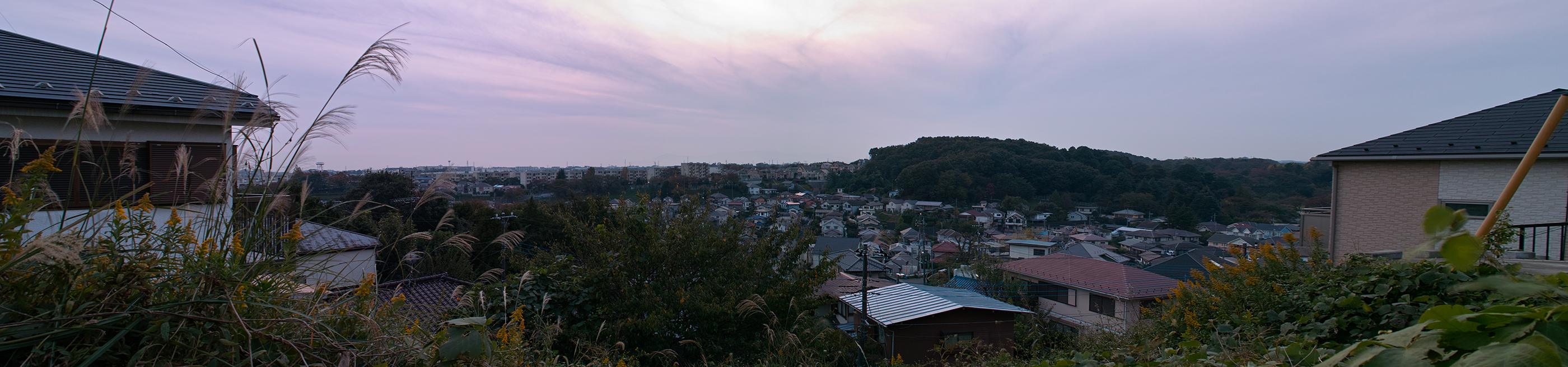 五所塚からの眺め